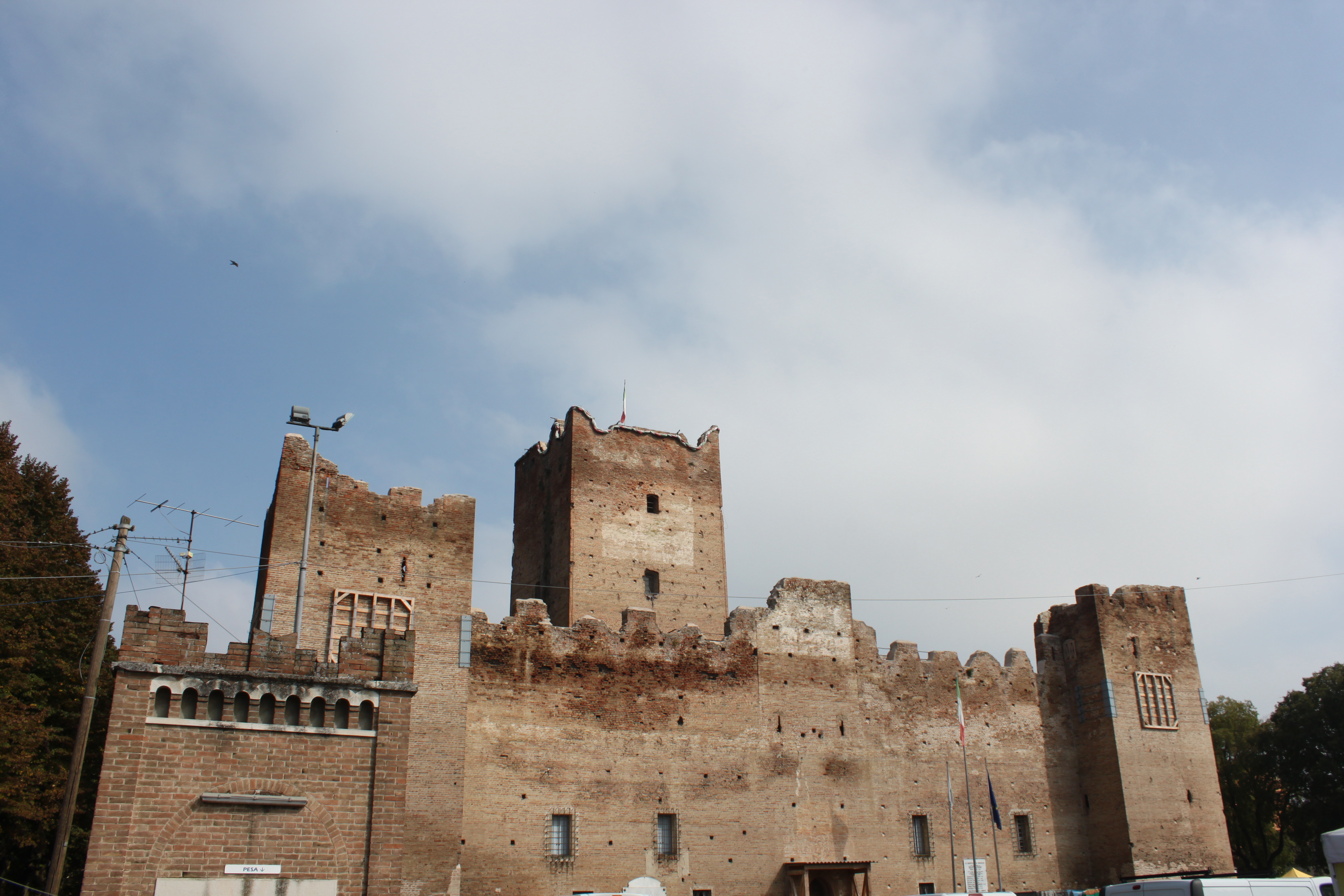 Rocca medievale e mastio This is a photo of a monument which is part of cultural heritage of Italy.